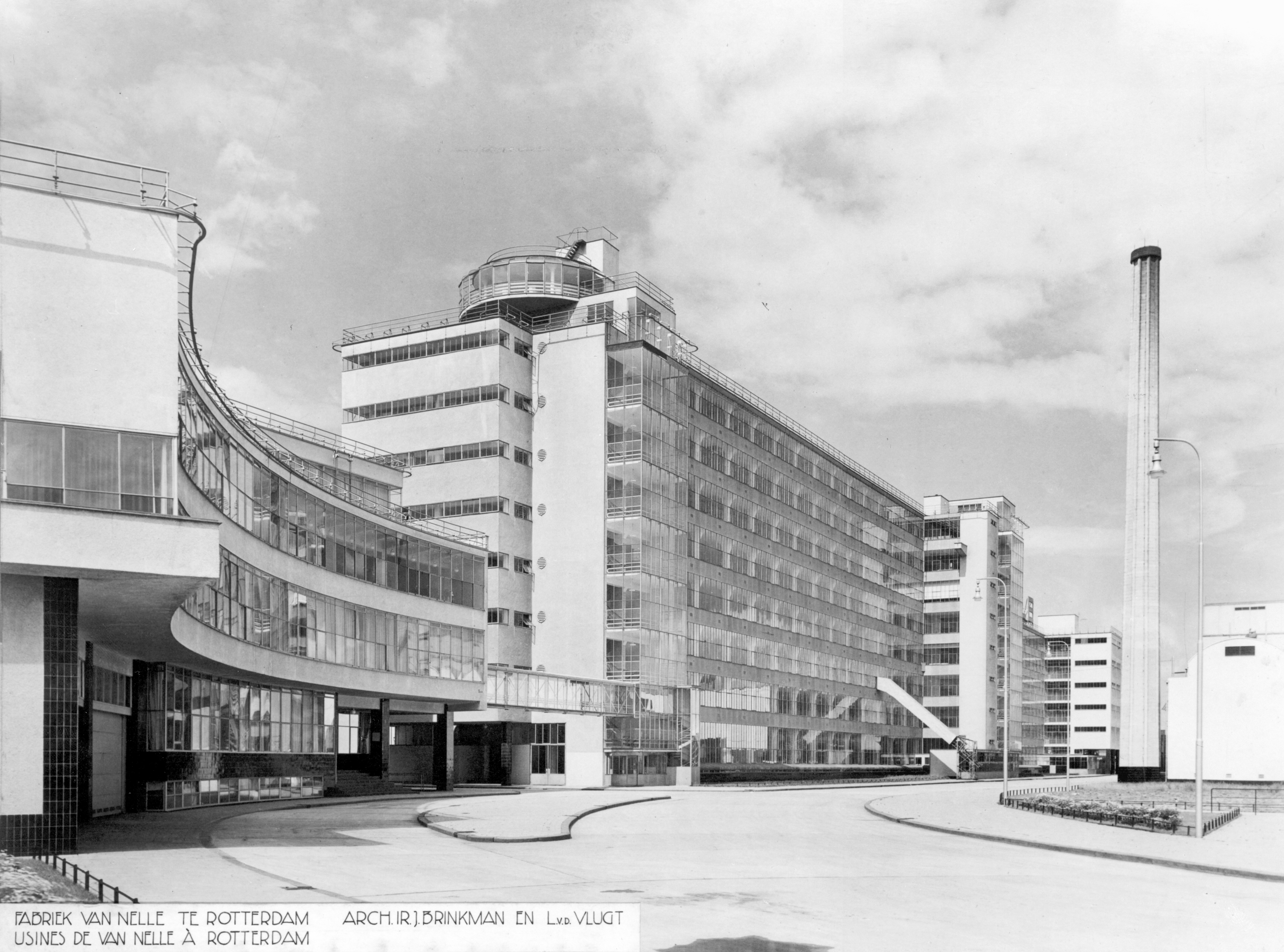 Van Nelle Ontwerpfabriek , Rotterdam